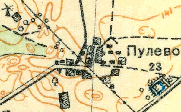 Топографическая карта Ленинградской области, квадрат О-35-24-А-г (Горки), деревня Пульево